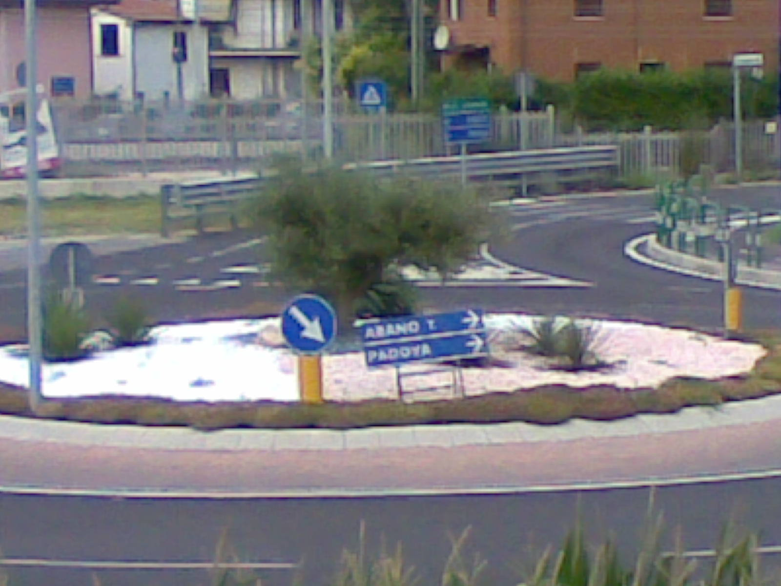 Arredo verde della rotonda di Via Campagna Bassa a Montegrotto Terme